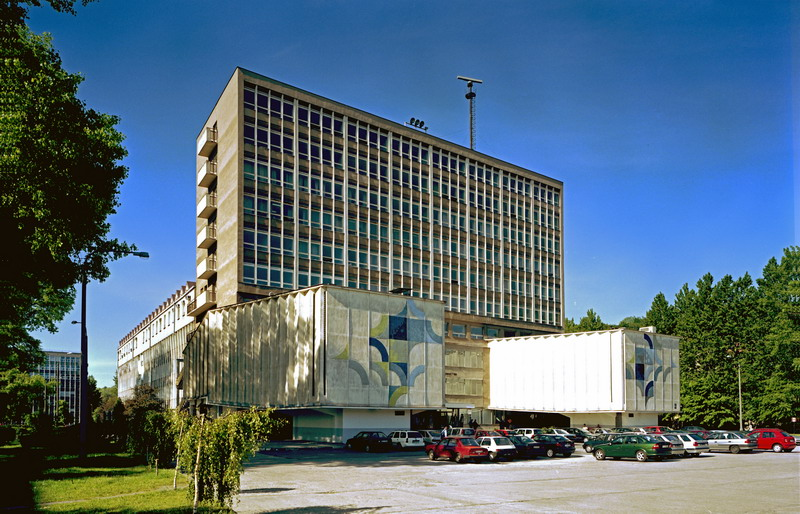 Budynek Wydziału Oceanotechniki PG, ul. Do Studzienki 16A.